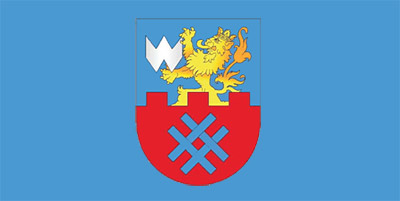 Flaga miasta Woronów